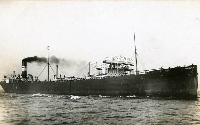 Der Tanker SAN NAZARIO, der später die Walkocherei THORSHAMMER wurde